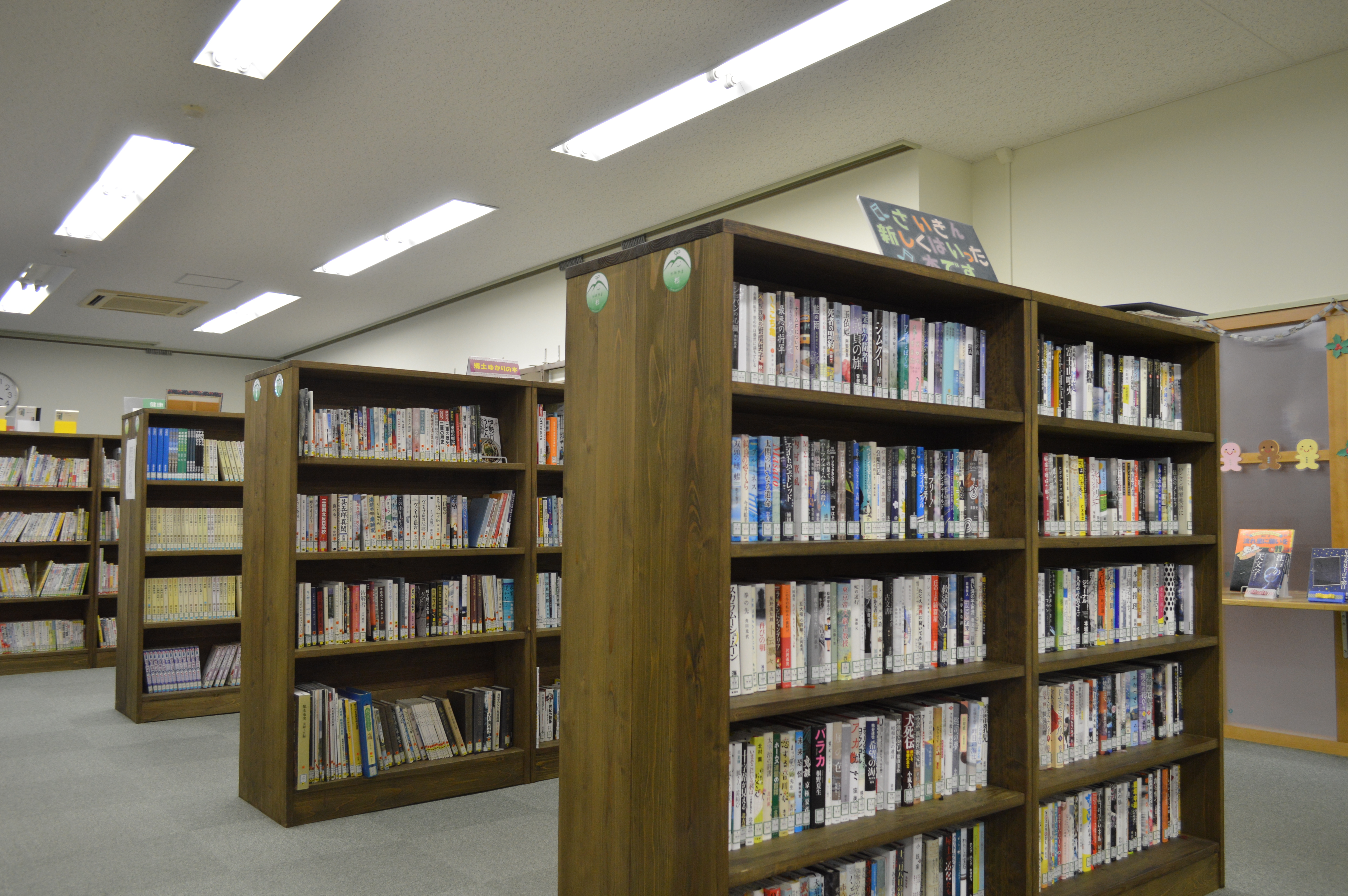 亀山市立図書館。「かめやま杉」を用いた書架。